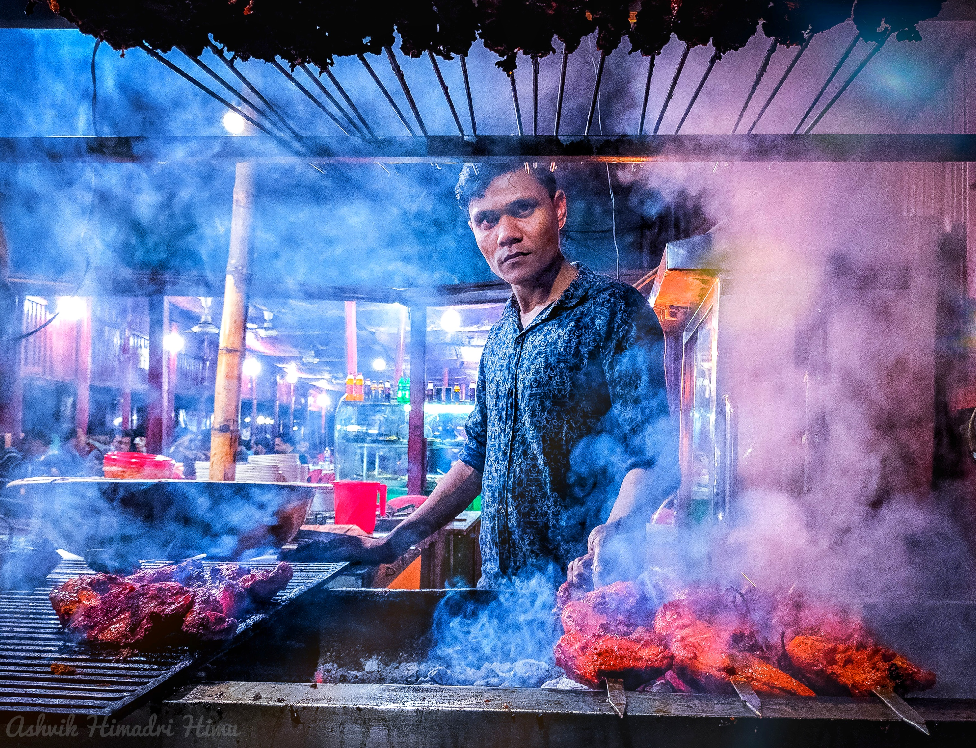 ঢাকার একটি কাবাবের দোকান